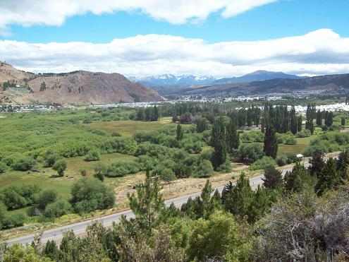 Ciudad de Esquel desde La Trochita; en primer plano, los suburbios del este.